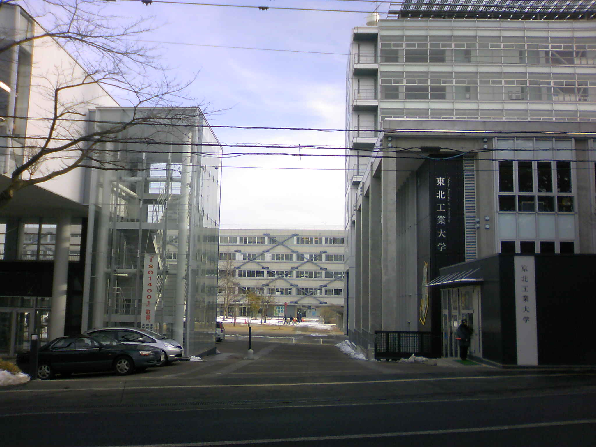 東北工業大学八木山キャンパス正門前